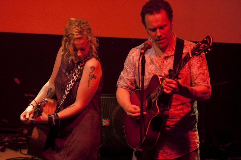 Anneke Van Giersbergen e Danny Cavanagh Live @ Blackmore Rock Bar - 05/06/2010 - São Paulo, Brasil É proibida a cópia ou reprodução deste material sem a autorização do autor. Por favor, não publique nada daqui sem o devido crédito. Fotógrafo: Alexandre Cardoso